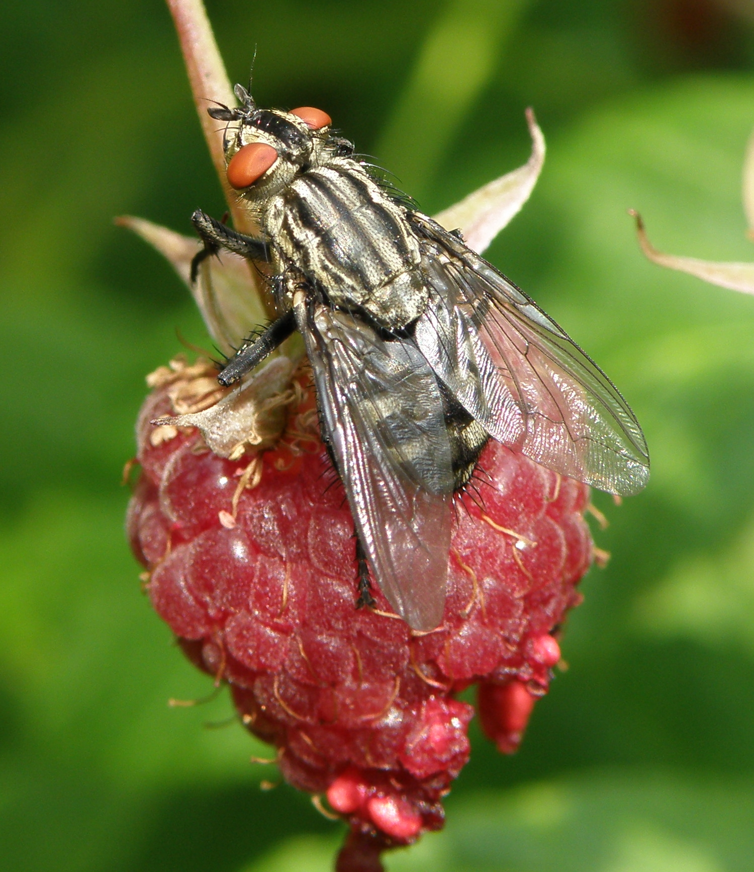 Mucha domowa (Musca domestica)